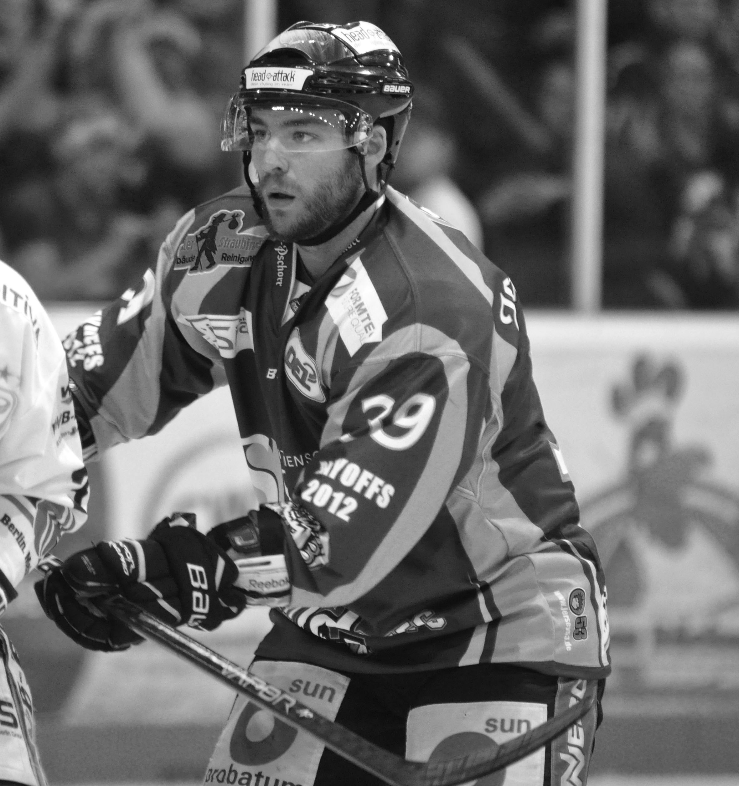 Straubing Tigers - Eisbären Berlin 11.04.2012 DEL PlayOff Halbfinale